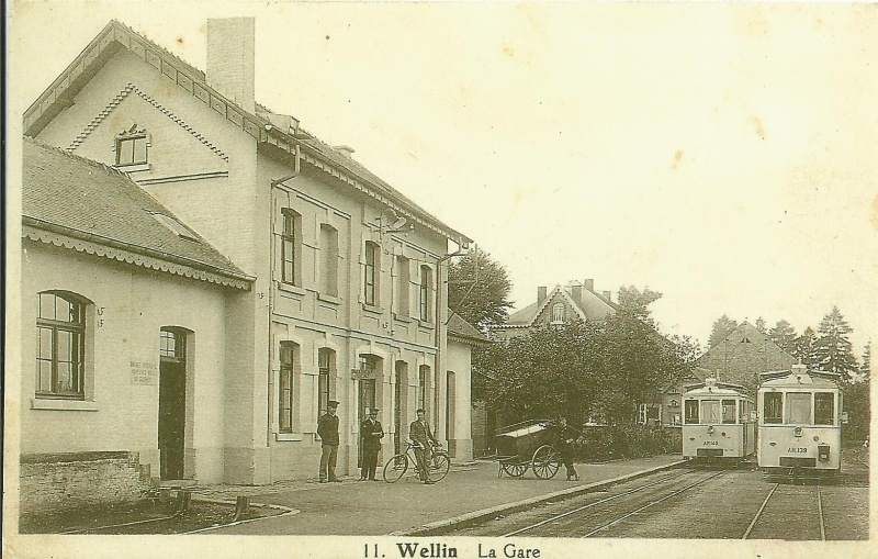 Autorails devant le bâtiment des recettes de la gare de Wellin.